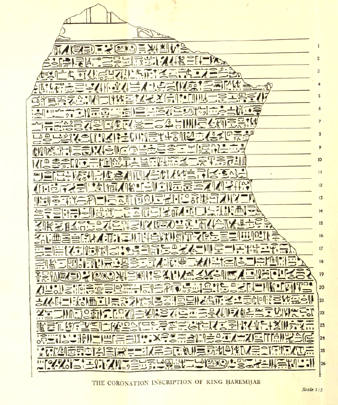 Quartzizová stéla -Korunovace faraona Haremheba z paláce Ptaha v Memfis